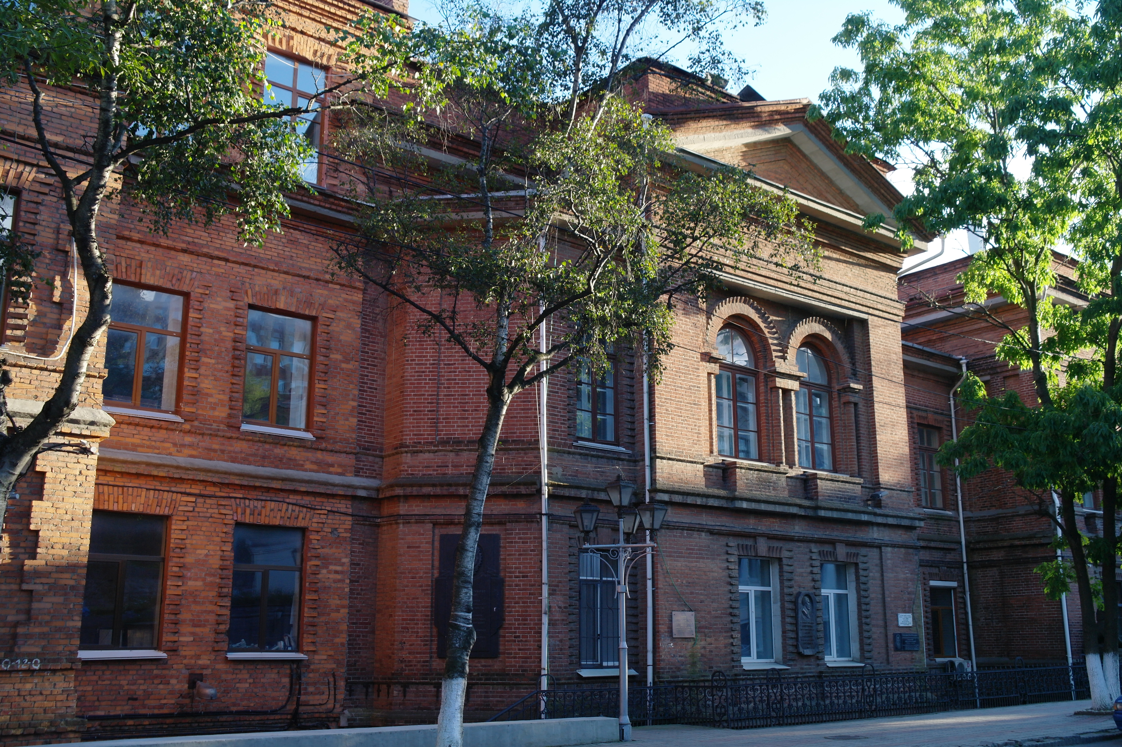 Здание Восточного института: улица Пушкинская, 10, Владивосток, Приморский край